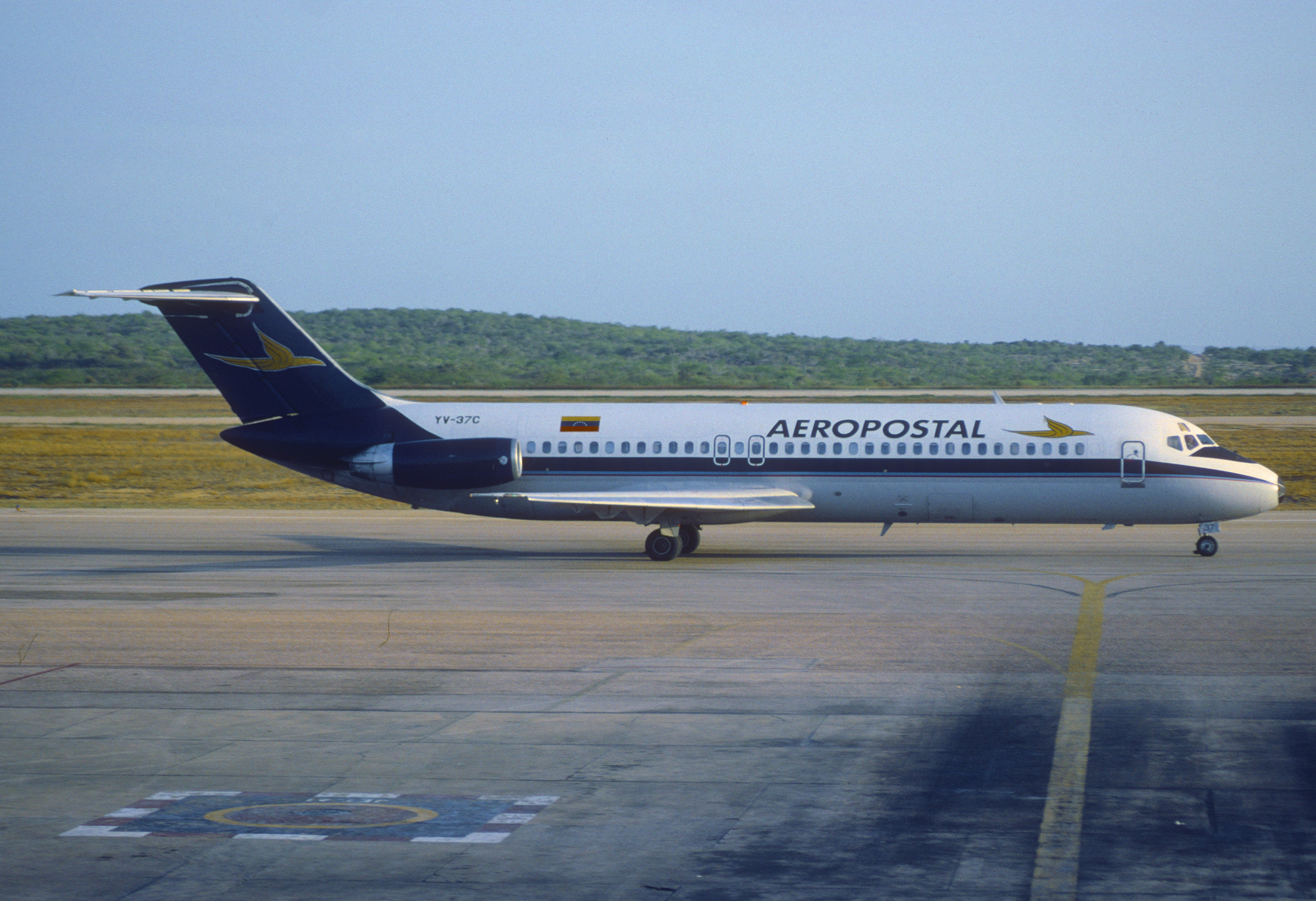 152ay - Aeropostal DC-9-34F (CF); YV-37C@PMV;10.10.2001